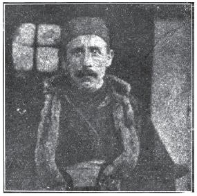 Иван Карайовев.